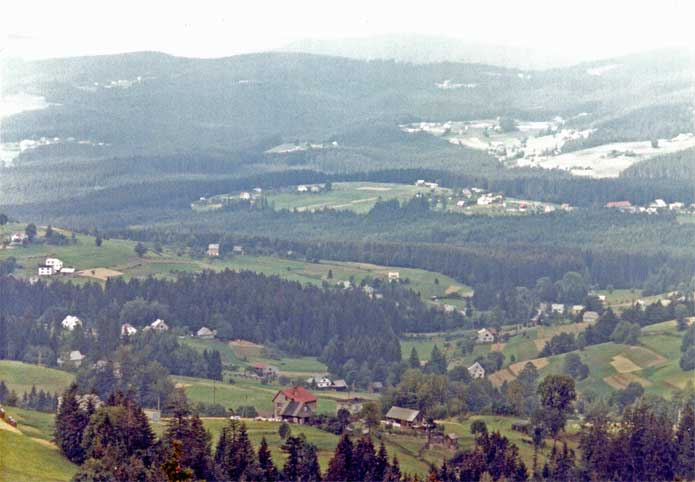 De Beskiden (ook: Woudkarpaten) vormen het centrale gedeelte van de Karpaten. foto gemaakt augustus 1993, gedigitaliseerd 16 november 2006